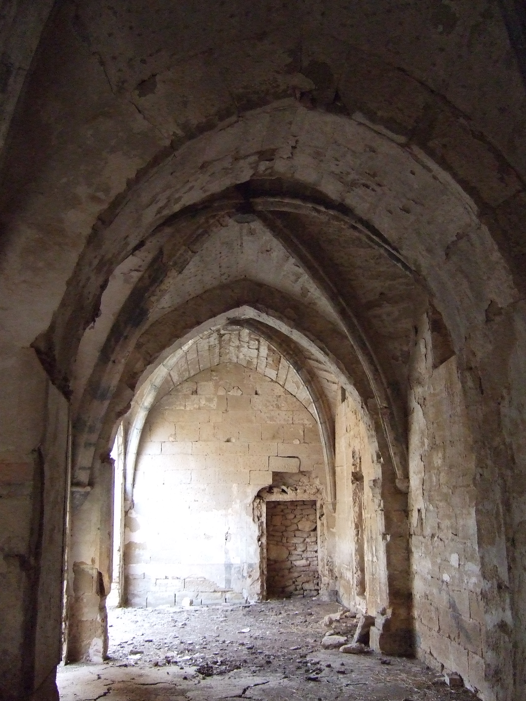 Maella - Antiguo priorato de Santa Susana en la Trapa